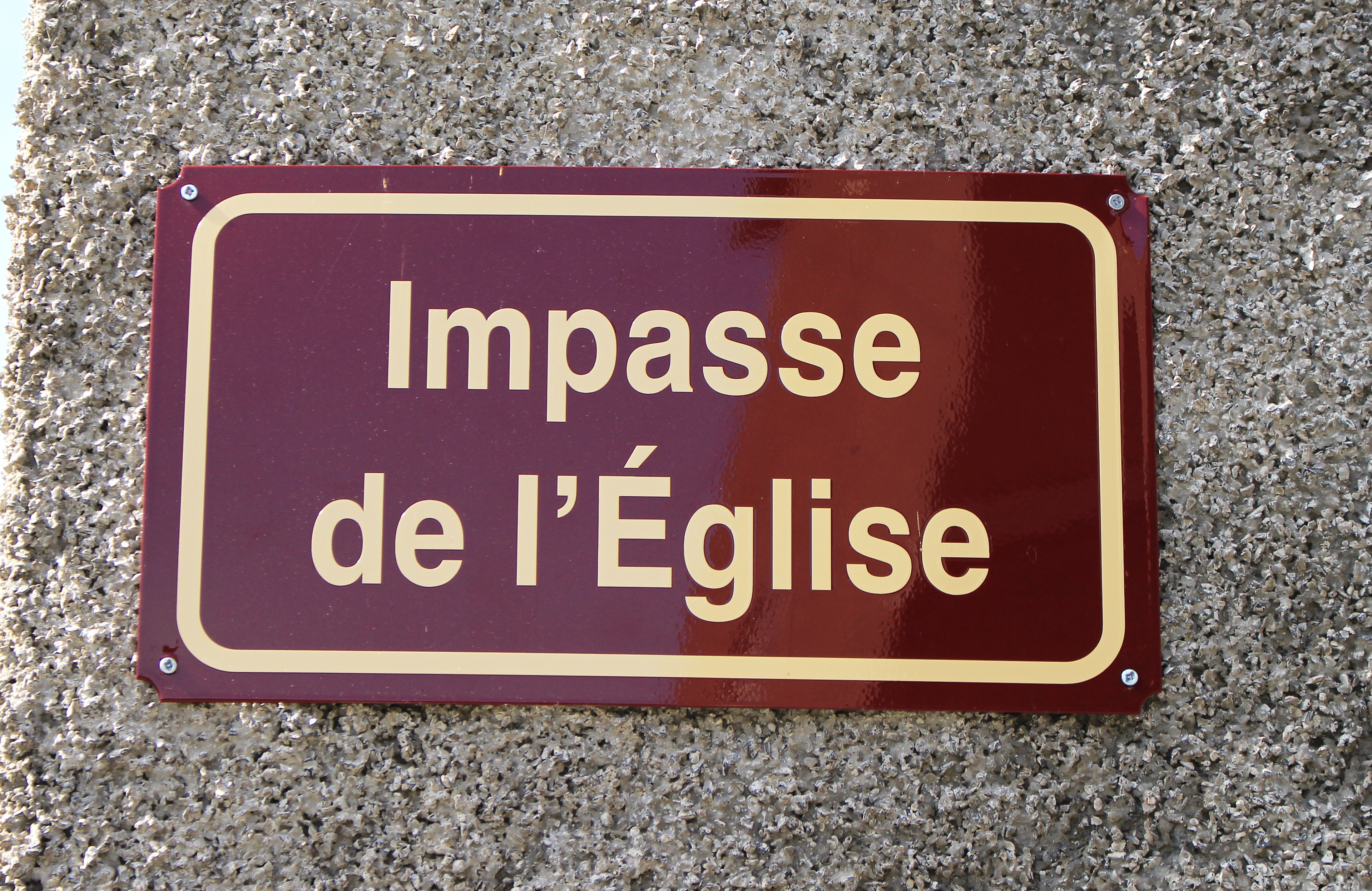 Rue du village de Lortet (Hautes-Pyrénées)